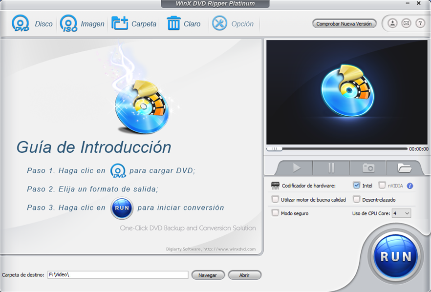 captura de pantalla de la interfaz principal de WinX DVD Ripper Platinum